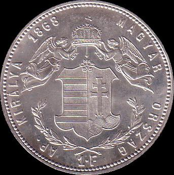 1 forint 1868 - reverse